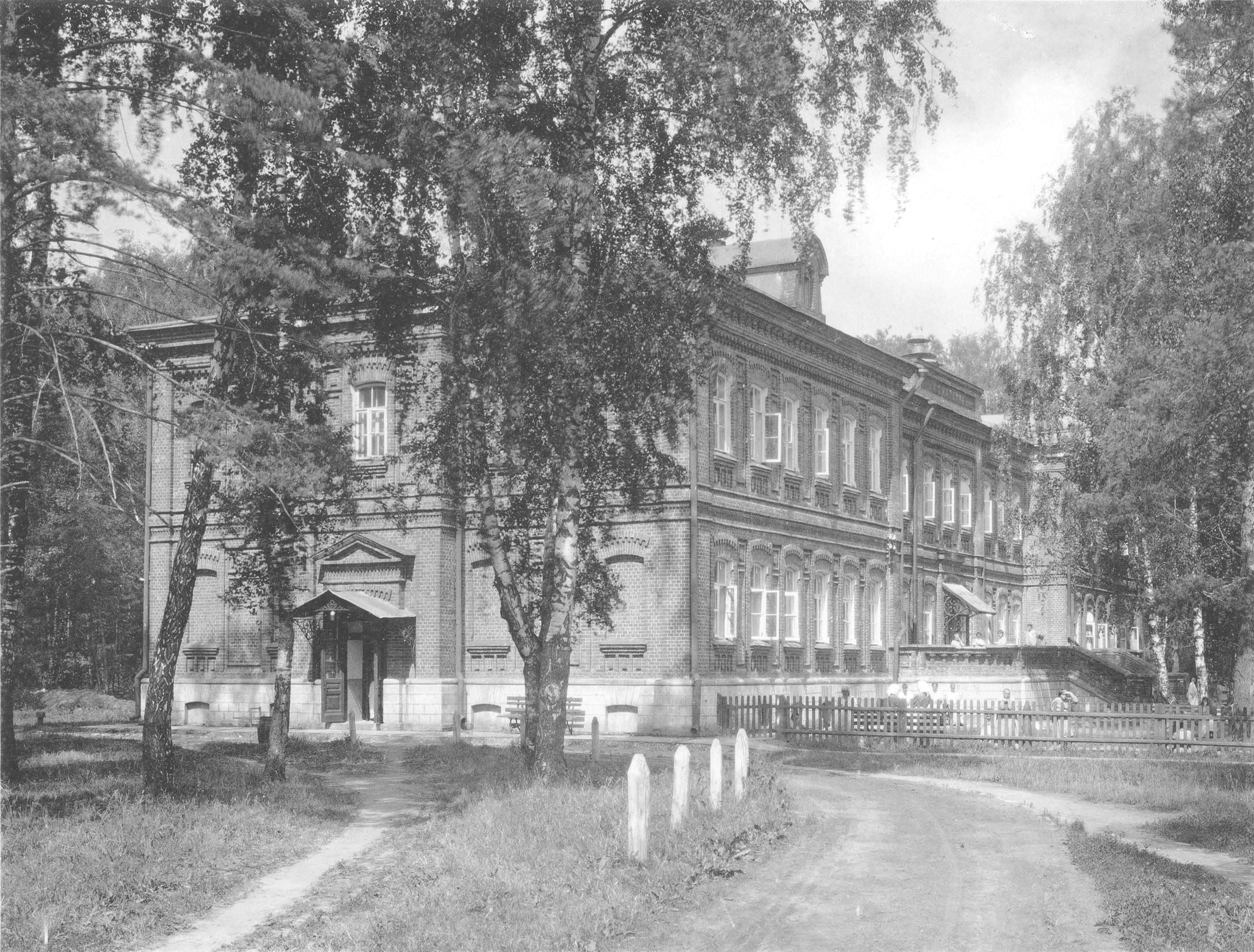 86. Психiатрическая больница им. Н. А. АлексЪева на Канатчиковой дачЪ. Корпусъ им. А. С. Капцова. (Москва)